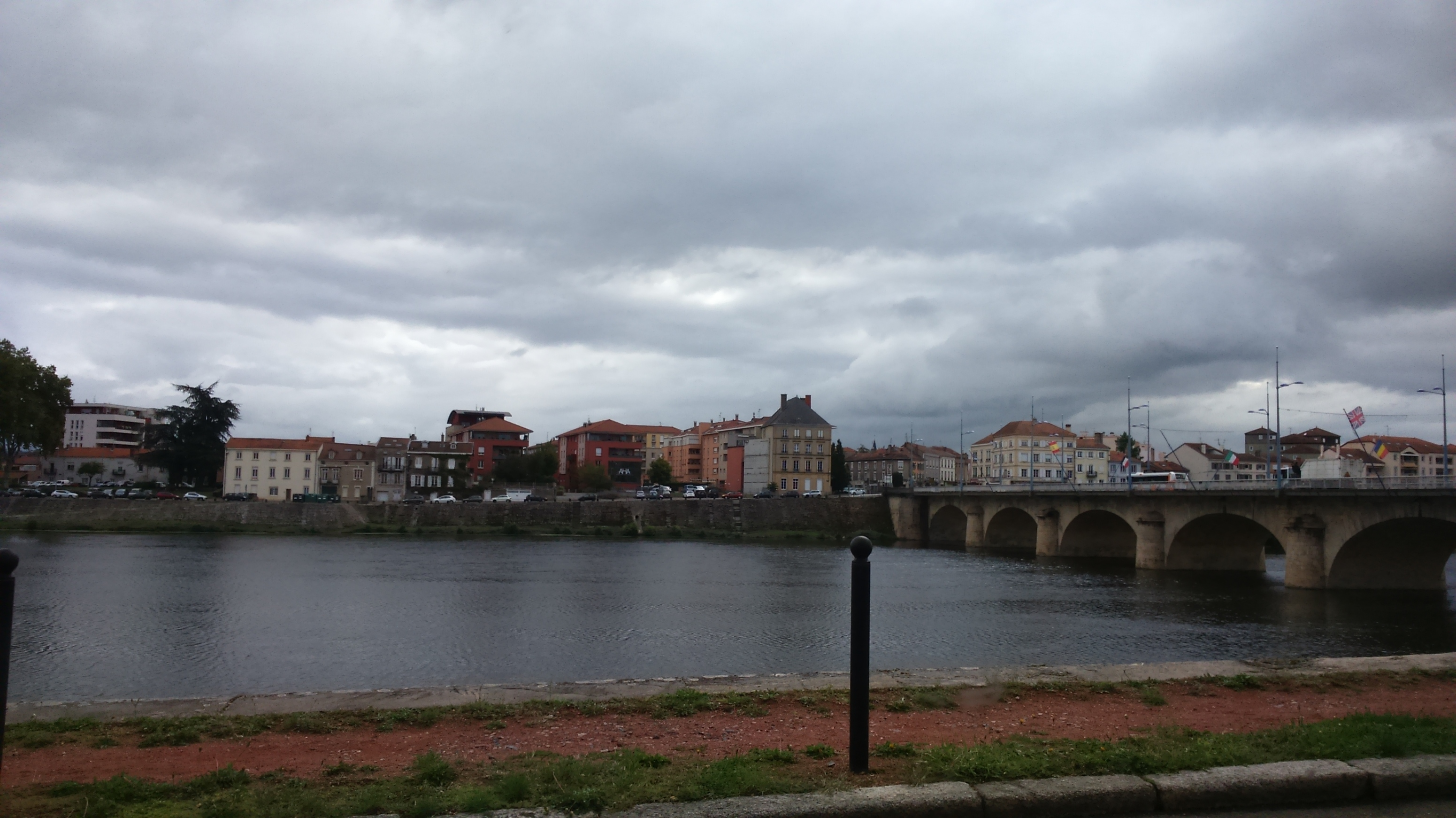 Roanne, Vue du Pont sur la la Loire, vers Le Coteau